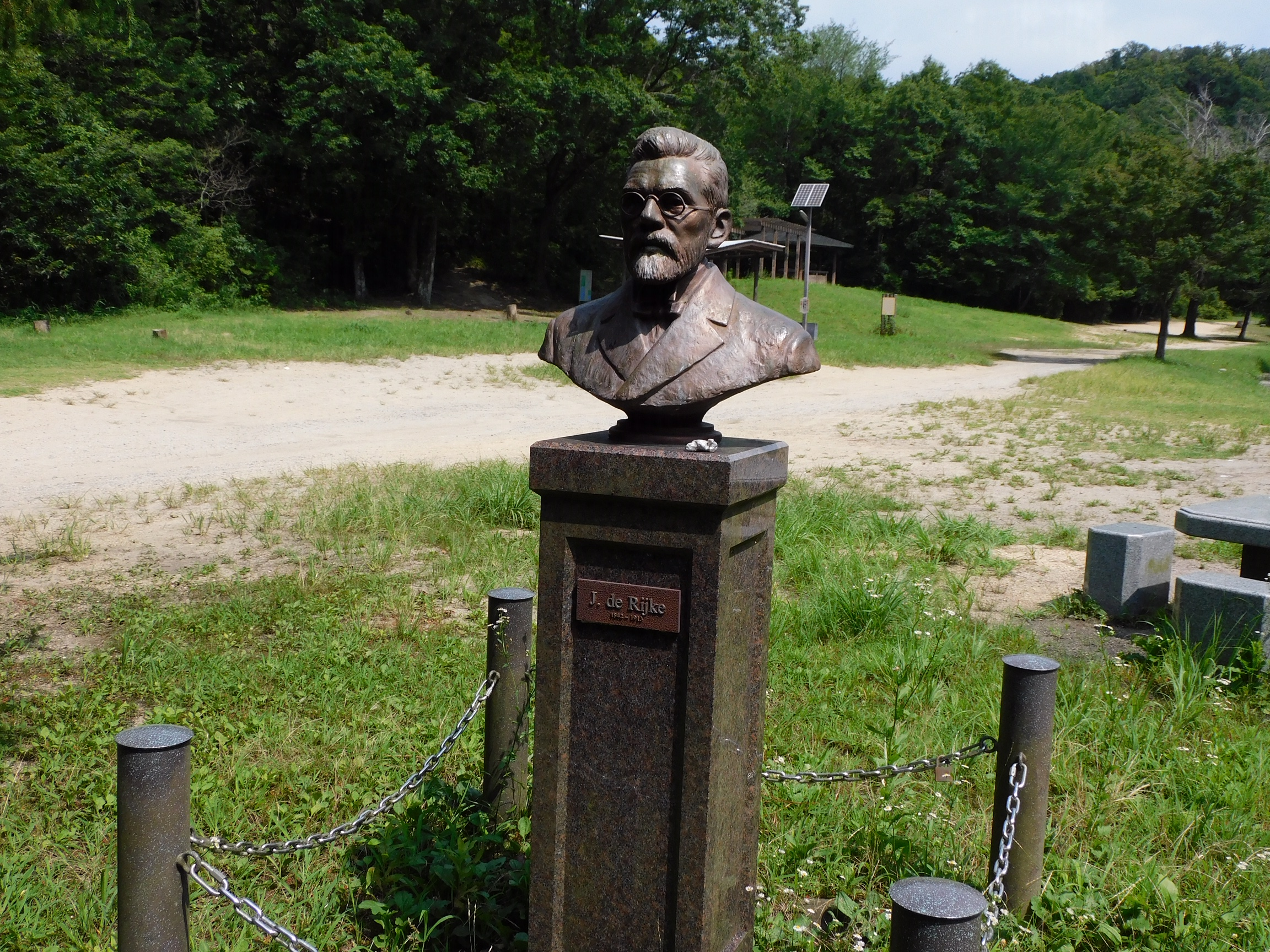 京都府木津川市山城町の砂防歴史公園にあるデ・レーケの銅像